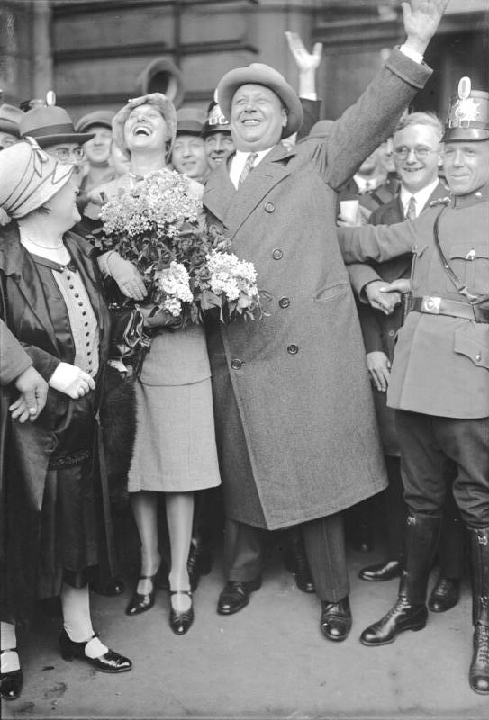 Die Ankunft des grössten Filmschauspielers der Welt Emil Jannings aus Amerika in Berlin! Emil Jannings und seine Gattin, blumengeschmückt bei ihrer Ankunft begrüssen vor Freude Berlin nach 2 1/2 jähriger Abwesenheit.